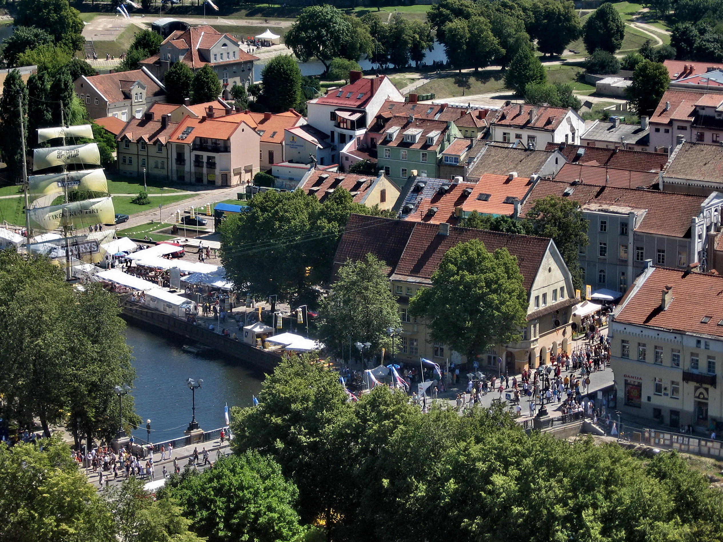 Klaipėda. Senamiestis.